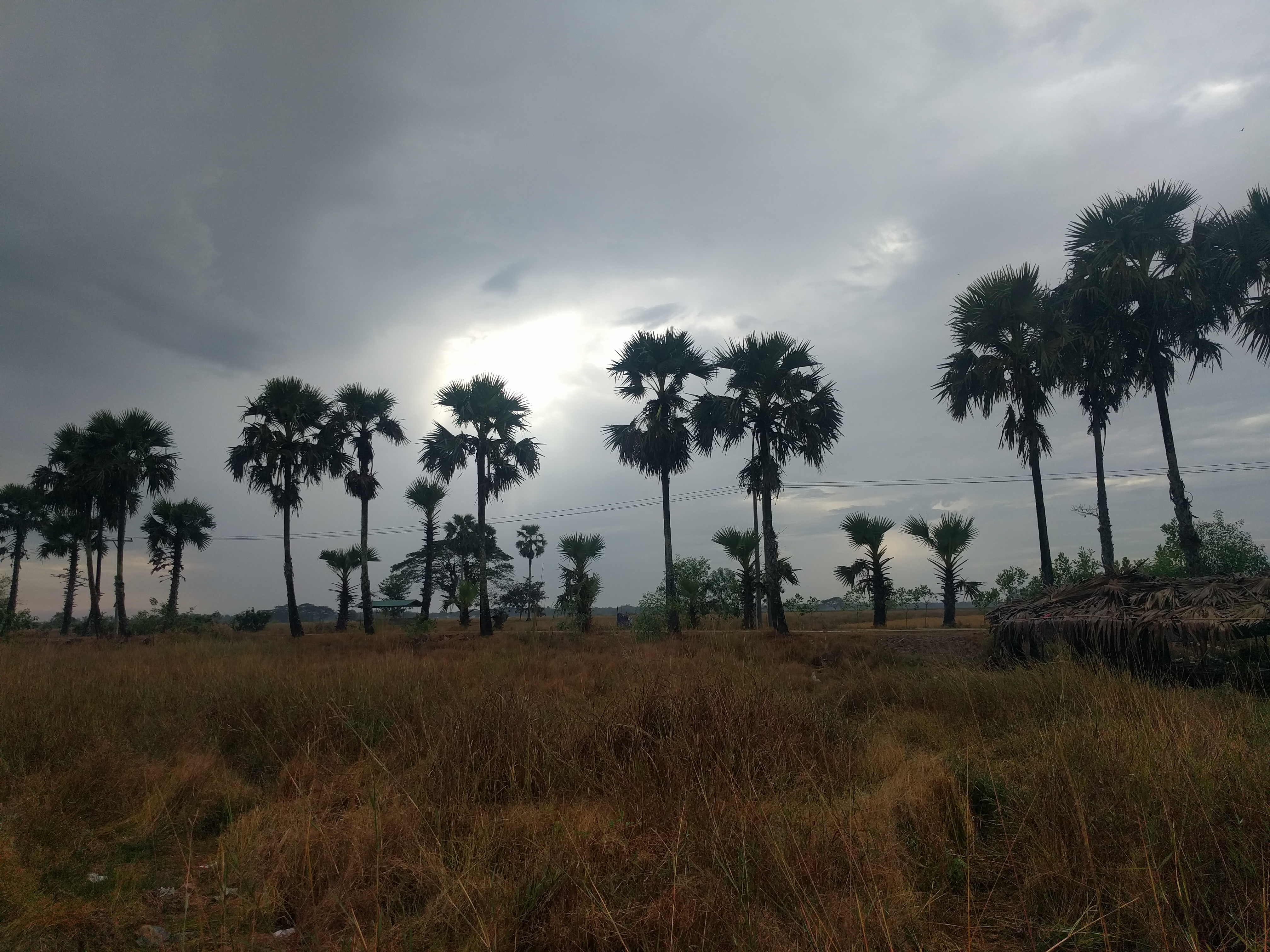 မြန်မာဘာသာ: ရန်ကုန်တိုင်းအတွင်းရှိ ထန်းတော